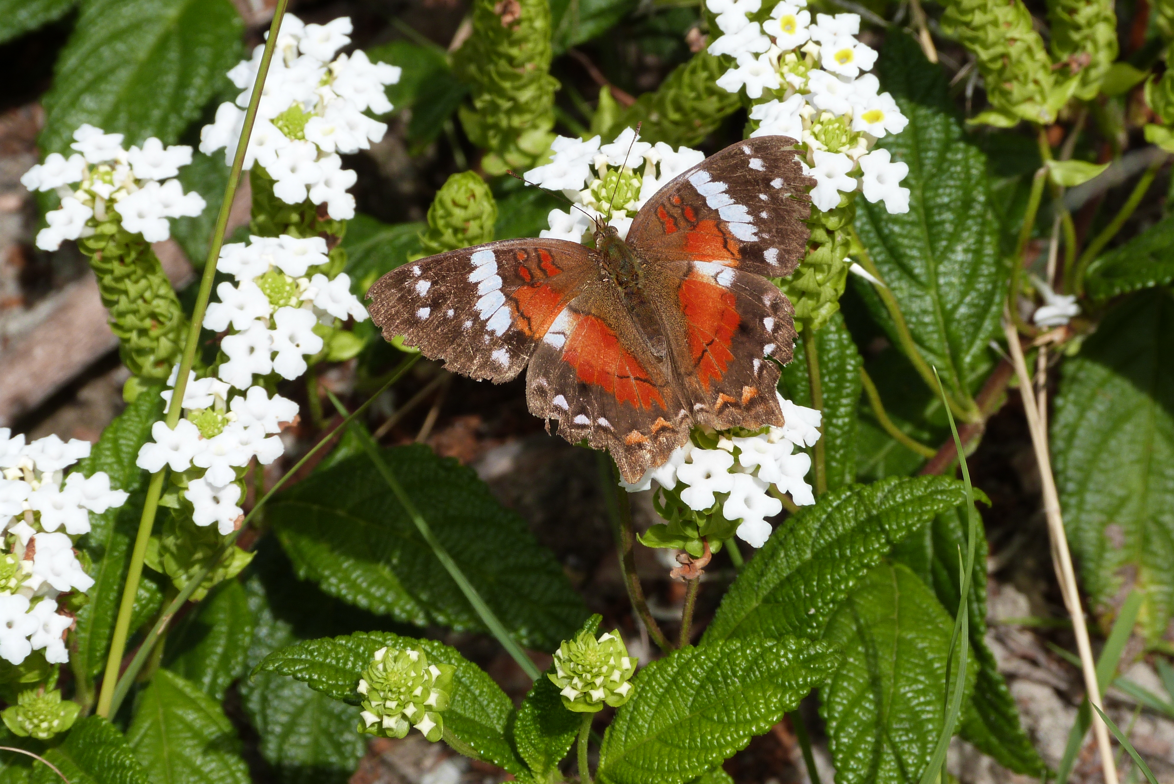 Foto tirada em Cunha-SP